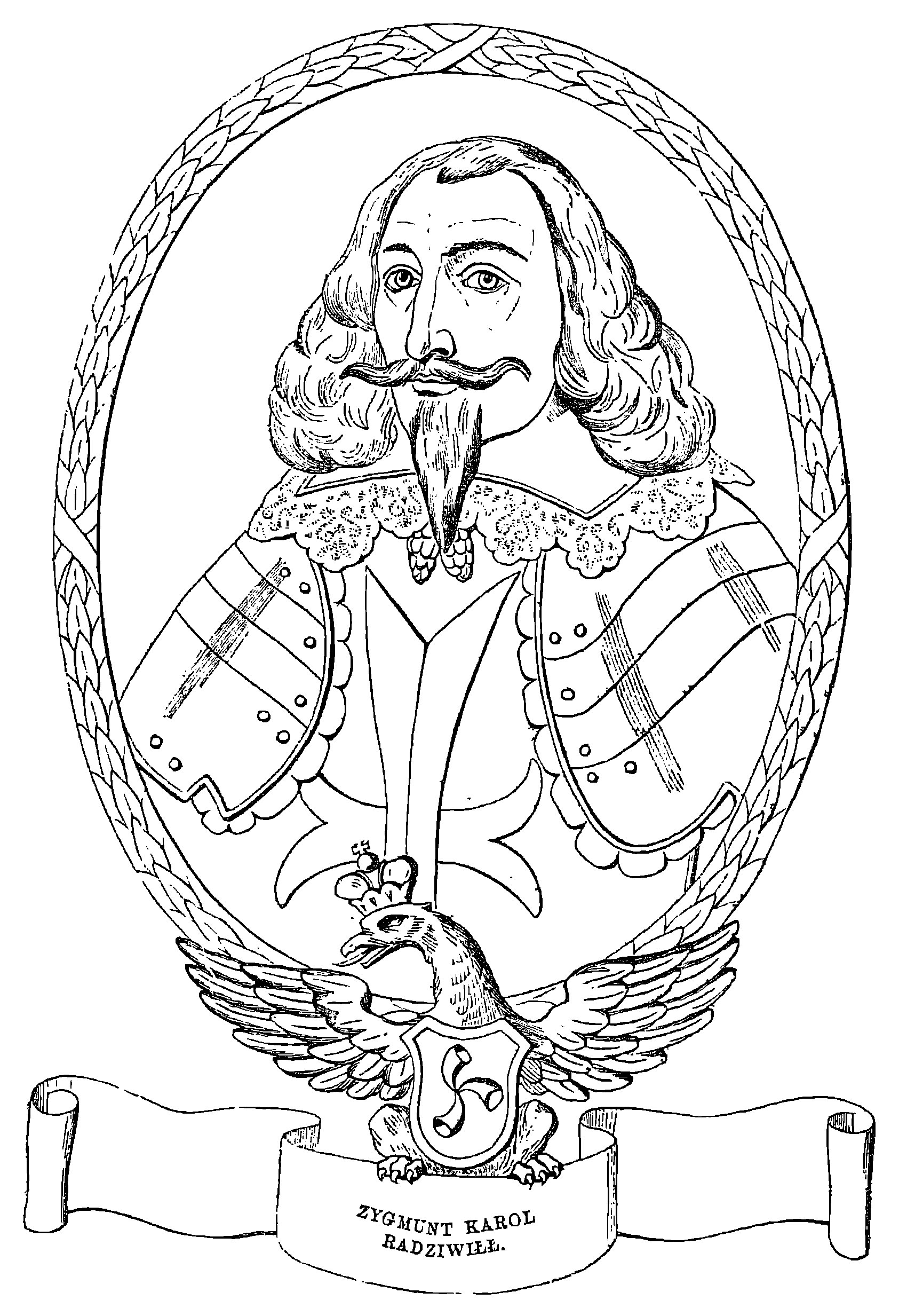 Беларуская (тарашкевіца): Партрэт Жыгімонта Караля Радзівіла (Žygimont Karal Radzivił)